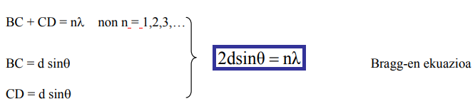 Bragg-en ekuazioa